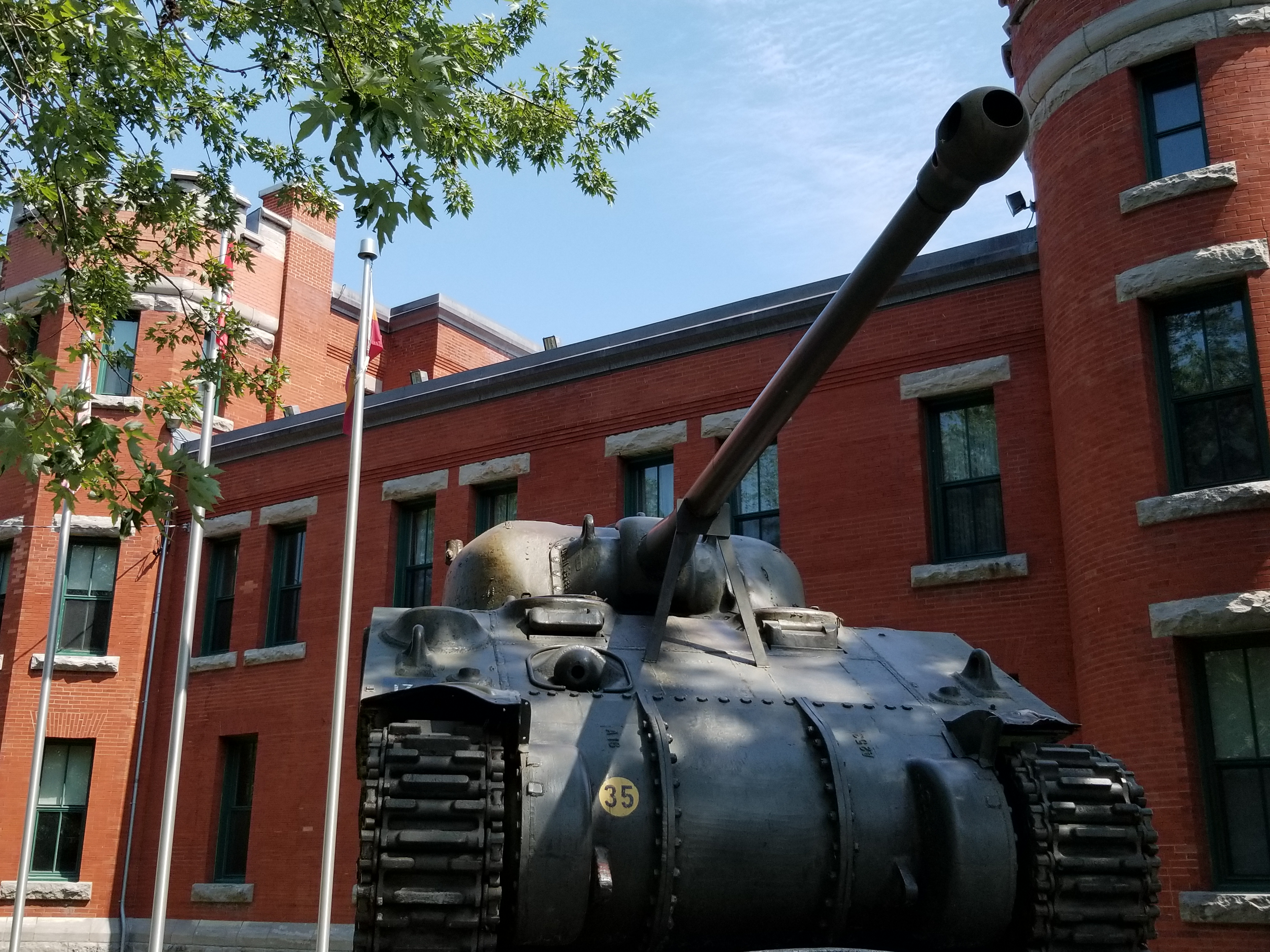 Sherman Firefly au manège militaire de Trois-Rivière, Québec, Canada